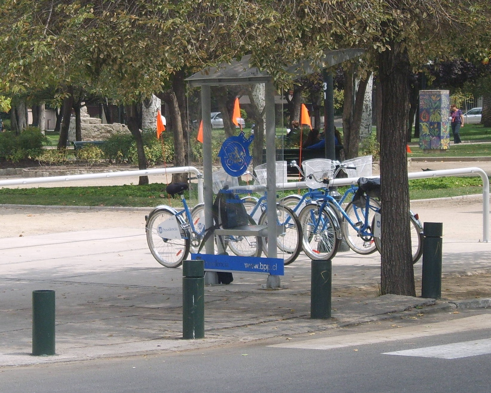 Bicicletas publicas en la comuna de Providencia, Chile